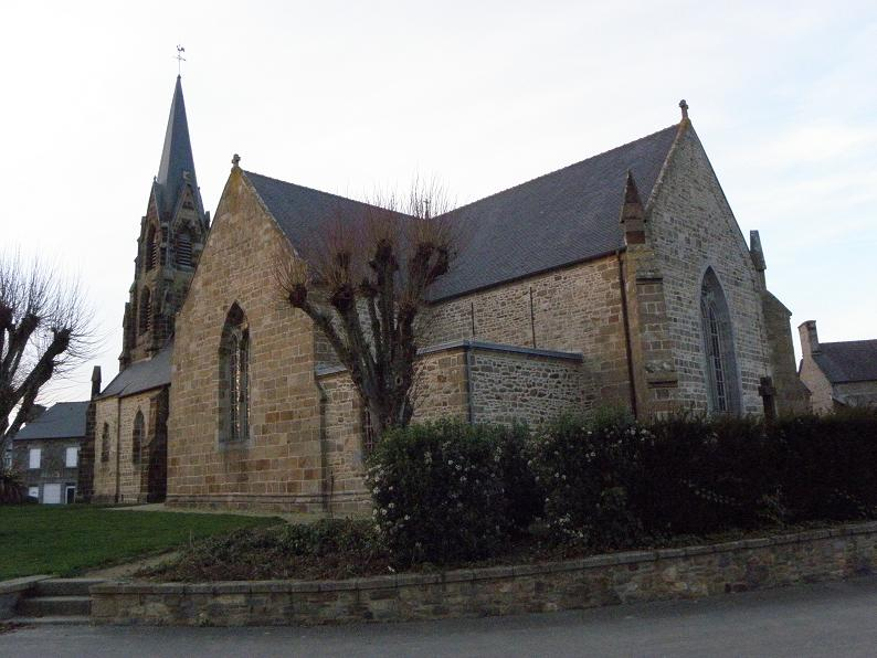 Église Saint-Martin et Saint-Samson de Cuguen (35).